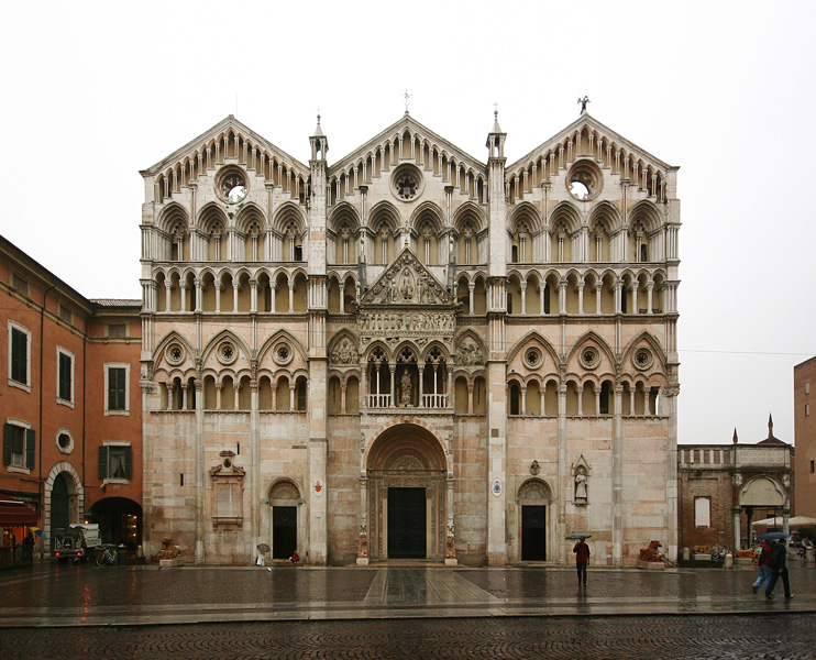 Kathedrale von Ferrara, Italien, Fassade